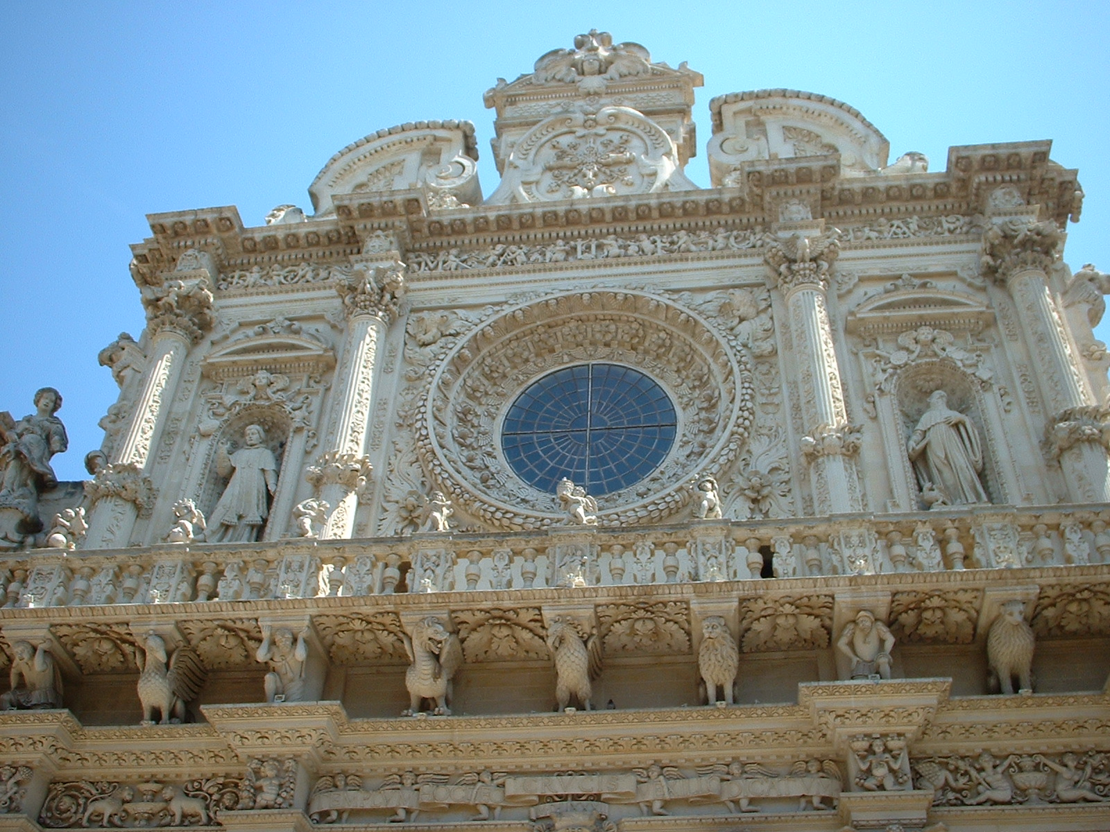 Chiesa di Santa Croce (Lecce) Questa immagine è stata scattata da Roberto Leinardi ed è sotto licenza GFDL